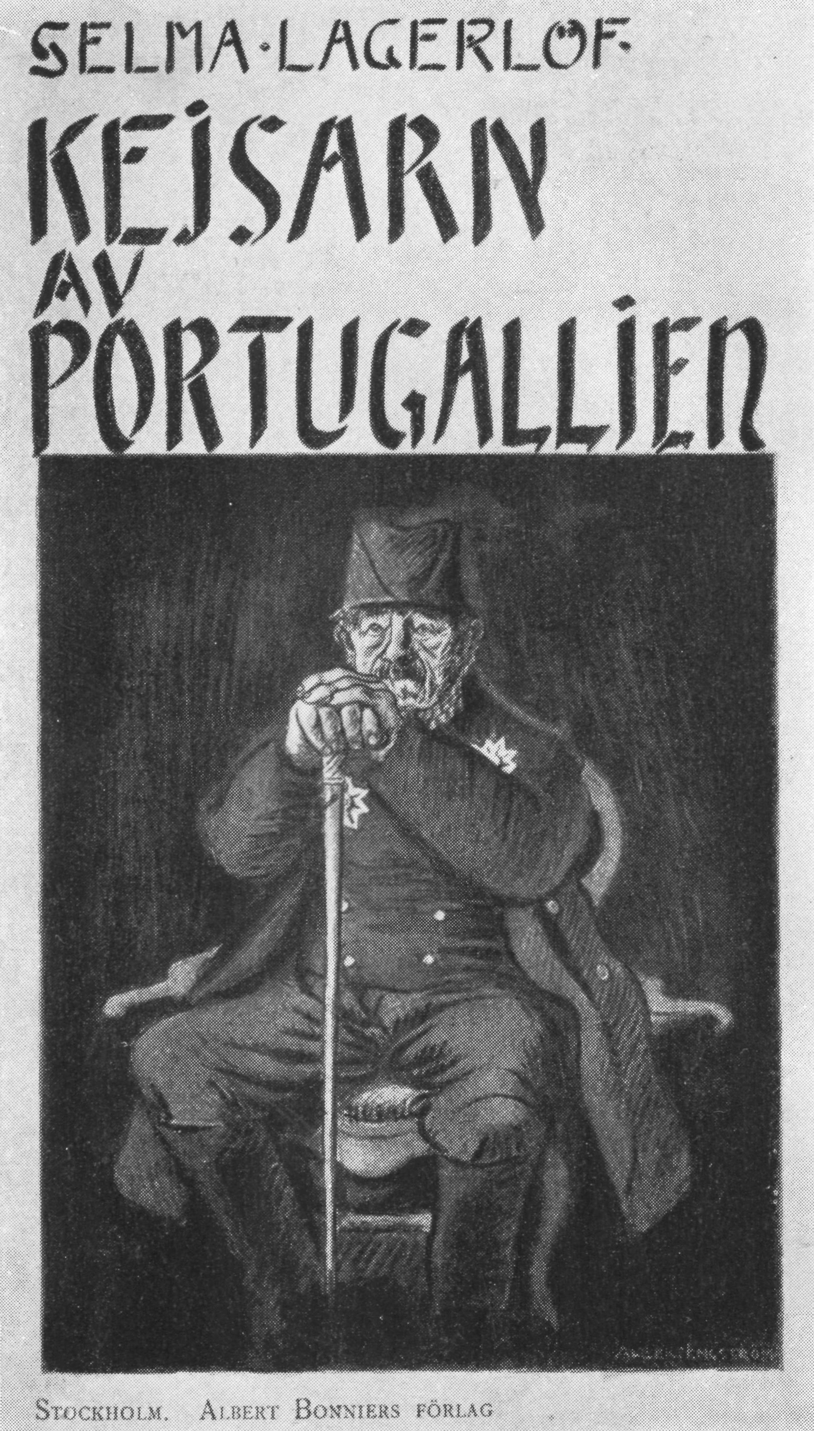 Bokomslag av Albert Engström till Selma Lagerlöf: Kejsaren av Portugallien, första upplagan 1914.